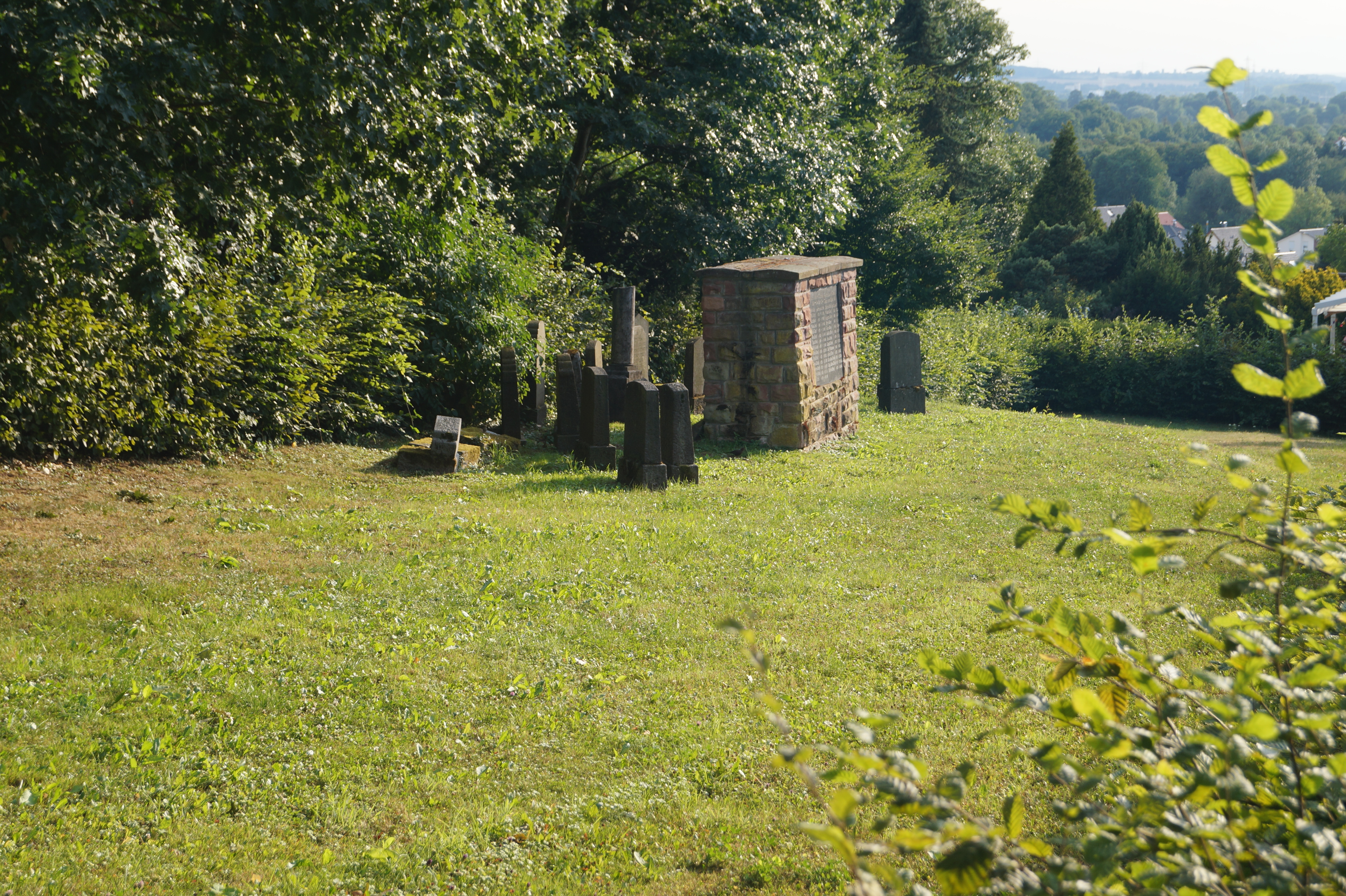 Jüdischer Friedhof Büdesheim (Hessen), Ansicht von Osten mit Mahnmal und den darum gruppierten Grabsteinen.